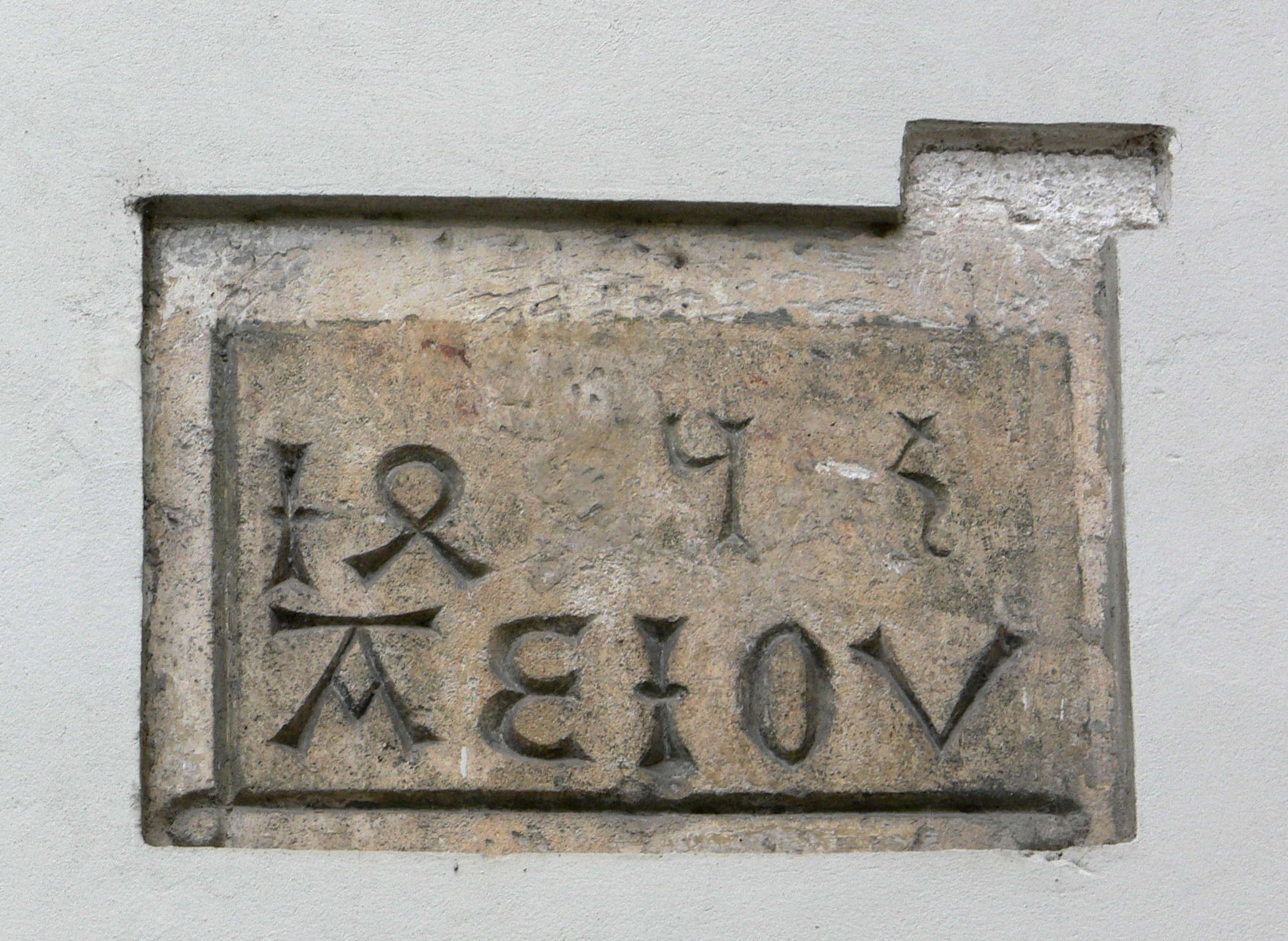 Graz, Grazer Burg 1453 A.E.I.O.U., Wahlspruch Kaiser Friedrichs III. an der Grazer Burg